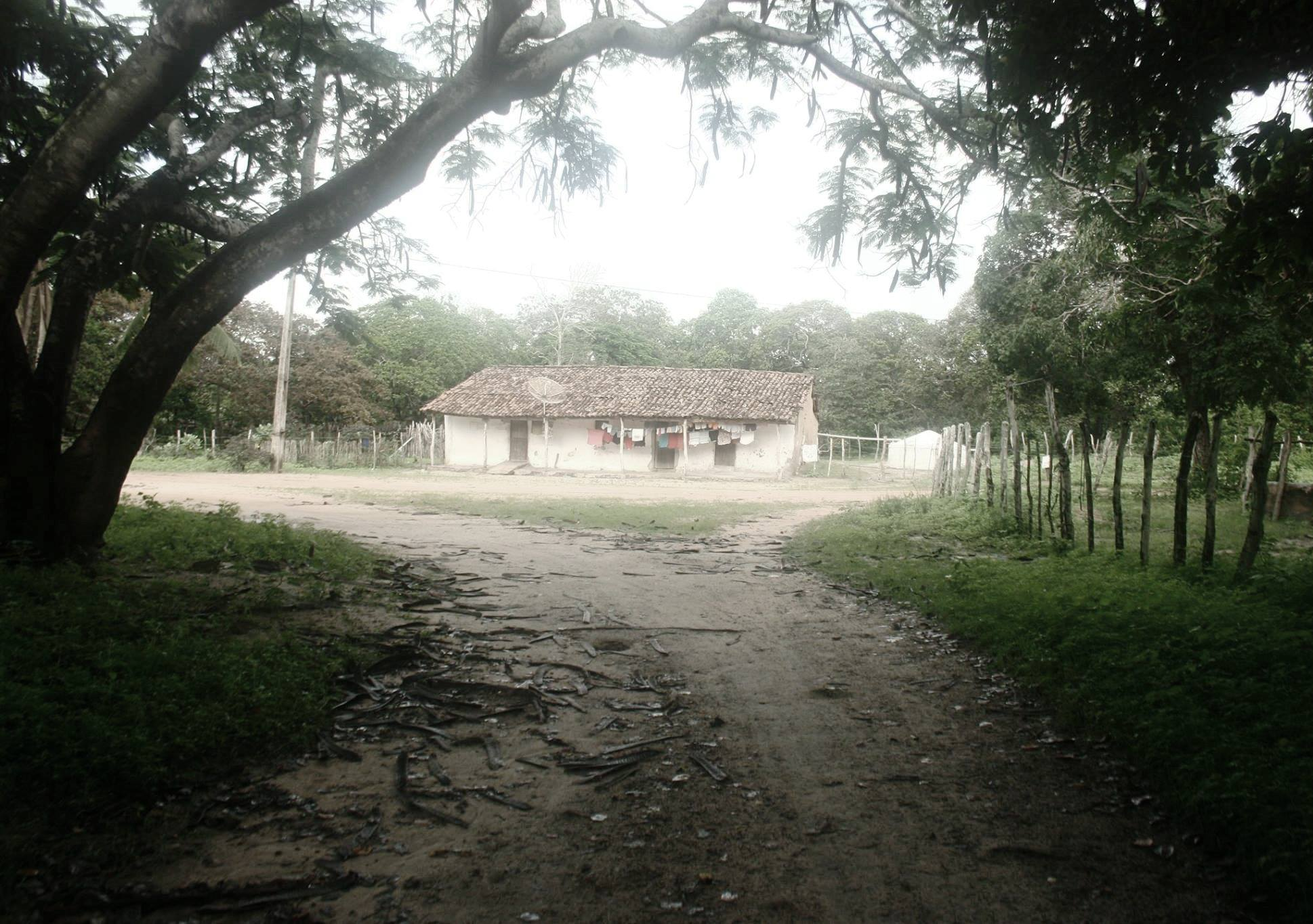 Essa é uma das casas mais antigas da Comunidade do Macaco em Itapipoca Ce